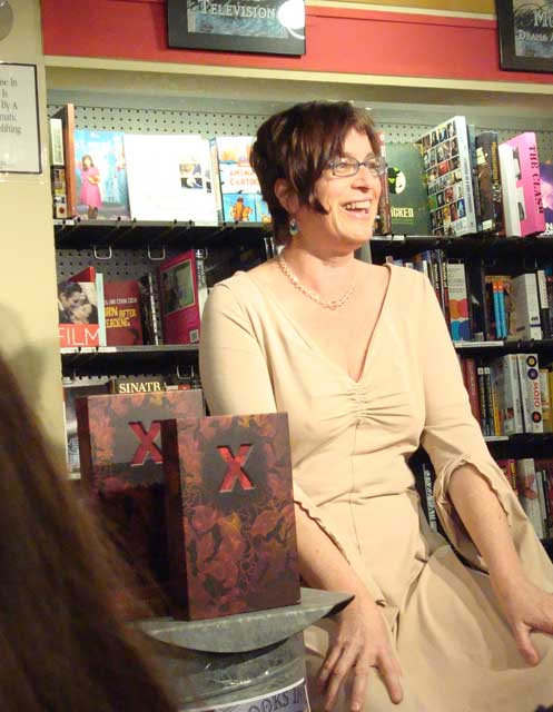 Susie Bright at Books Inc.